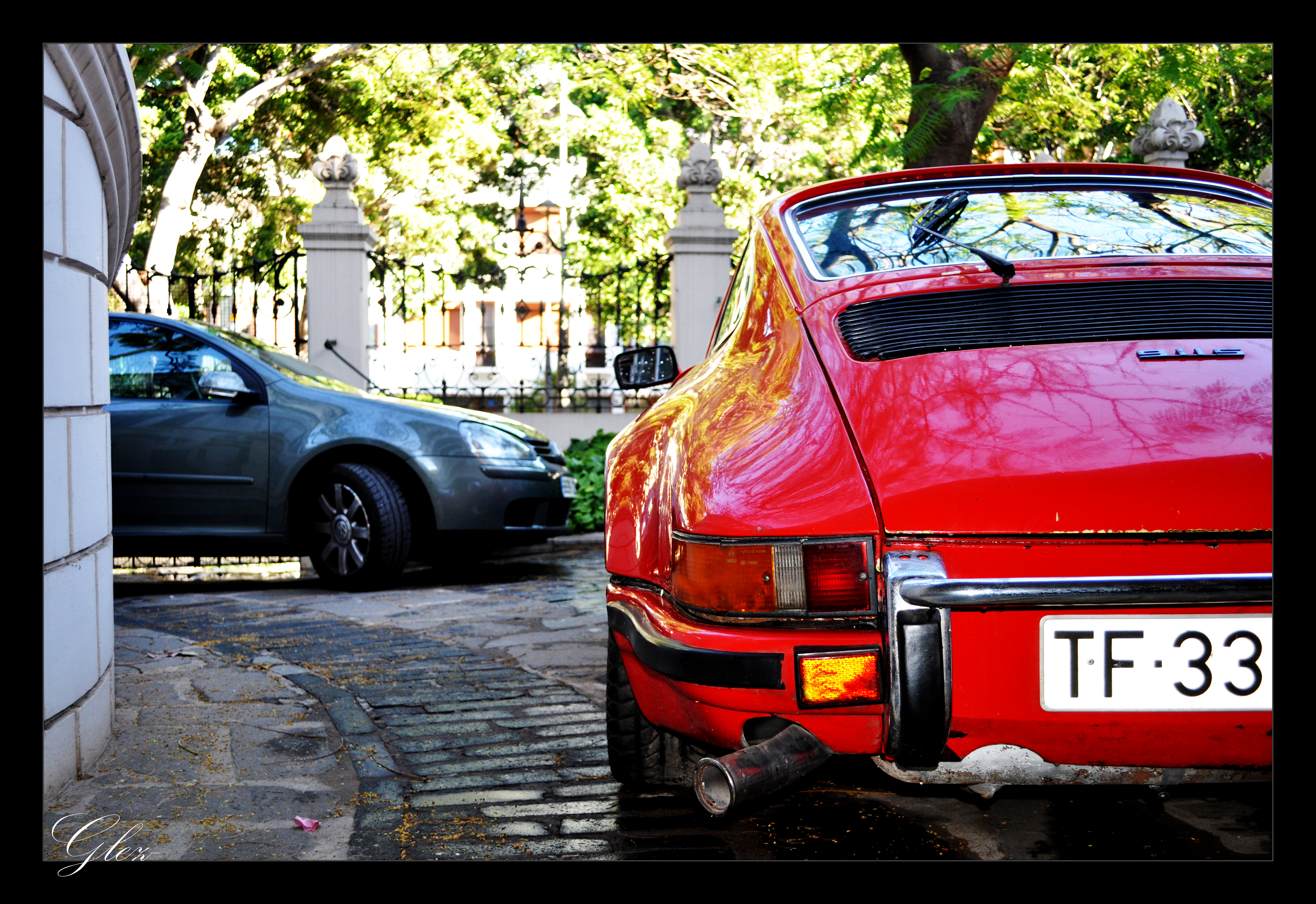 Porsche 911 ST Investigation "code m470".jpg